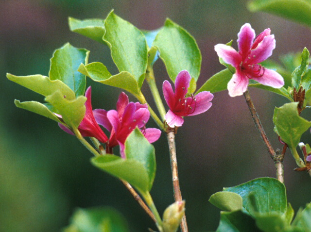 Rhododendron sanctum